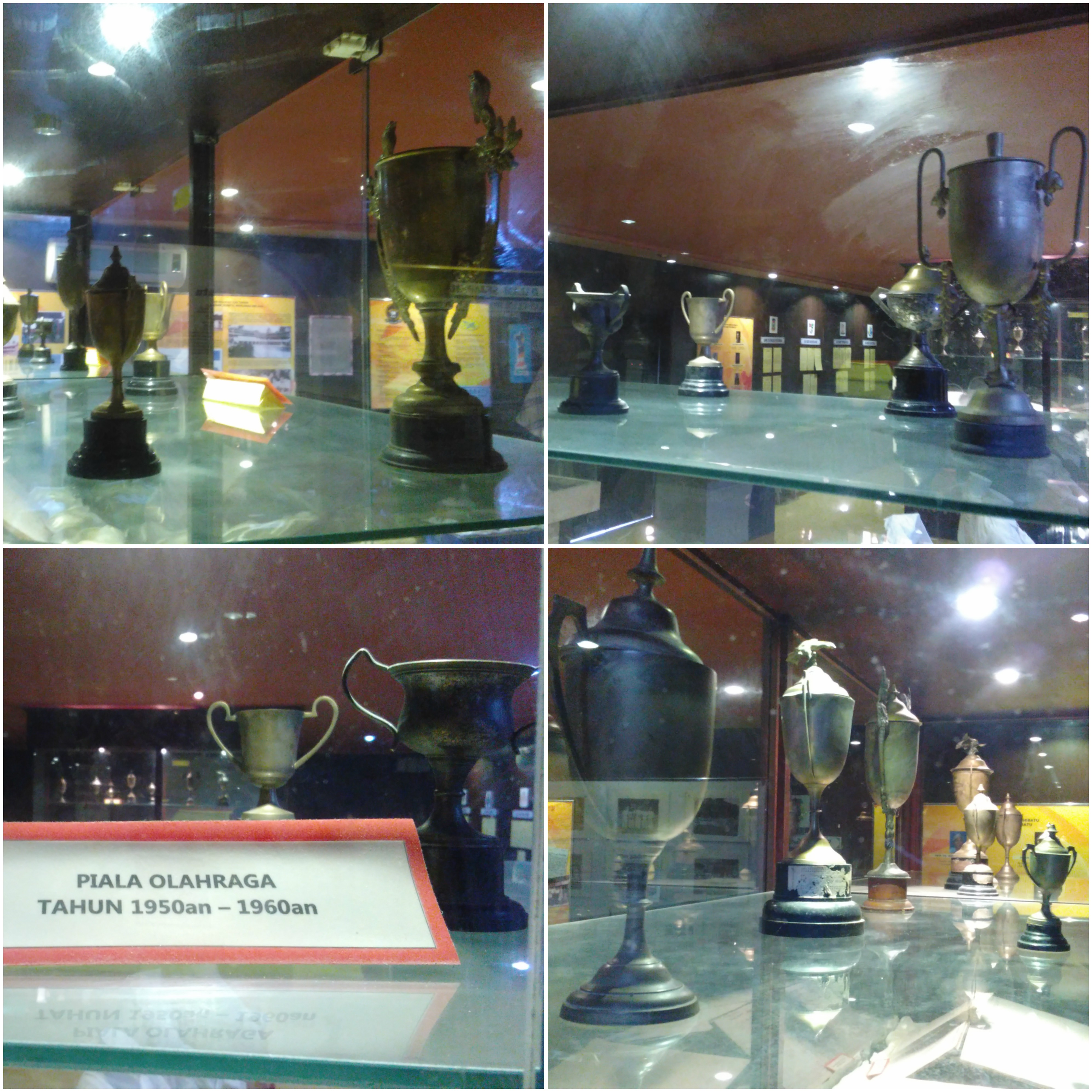 Piala Kejohanan